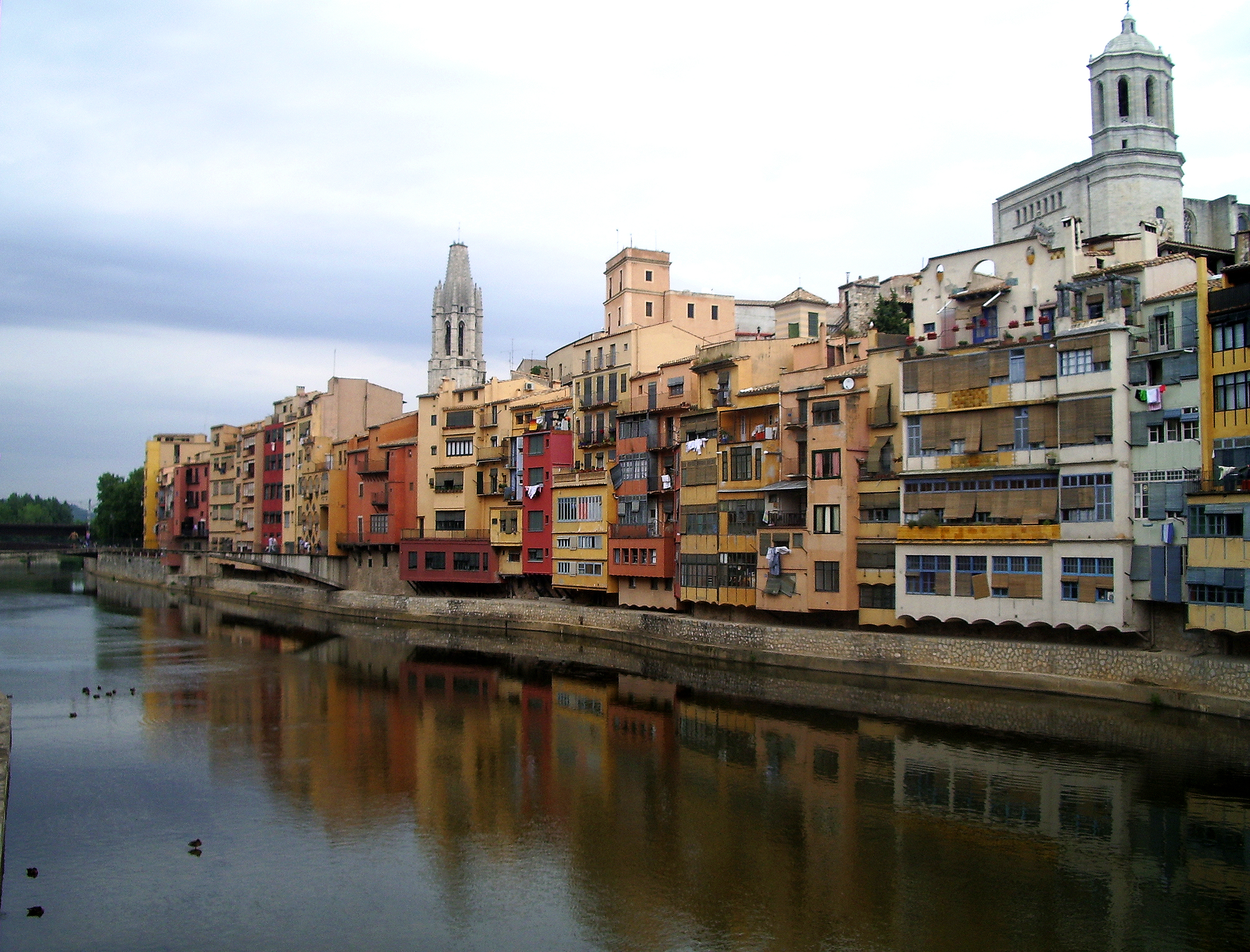 Vista de Gerona y el río Oñar (España)